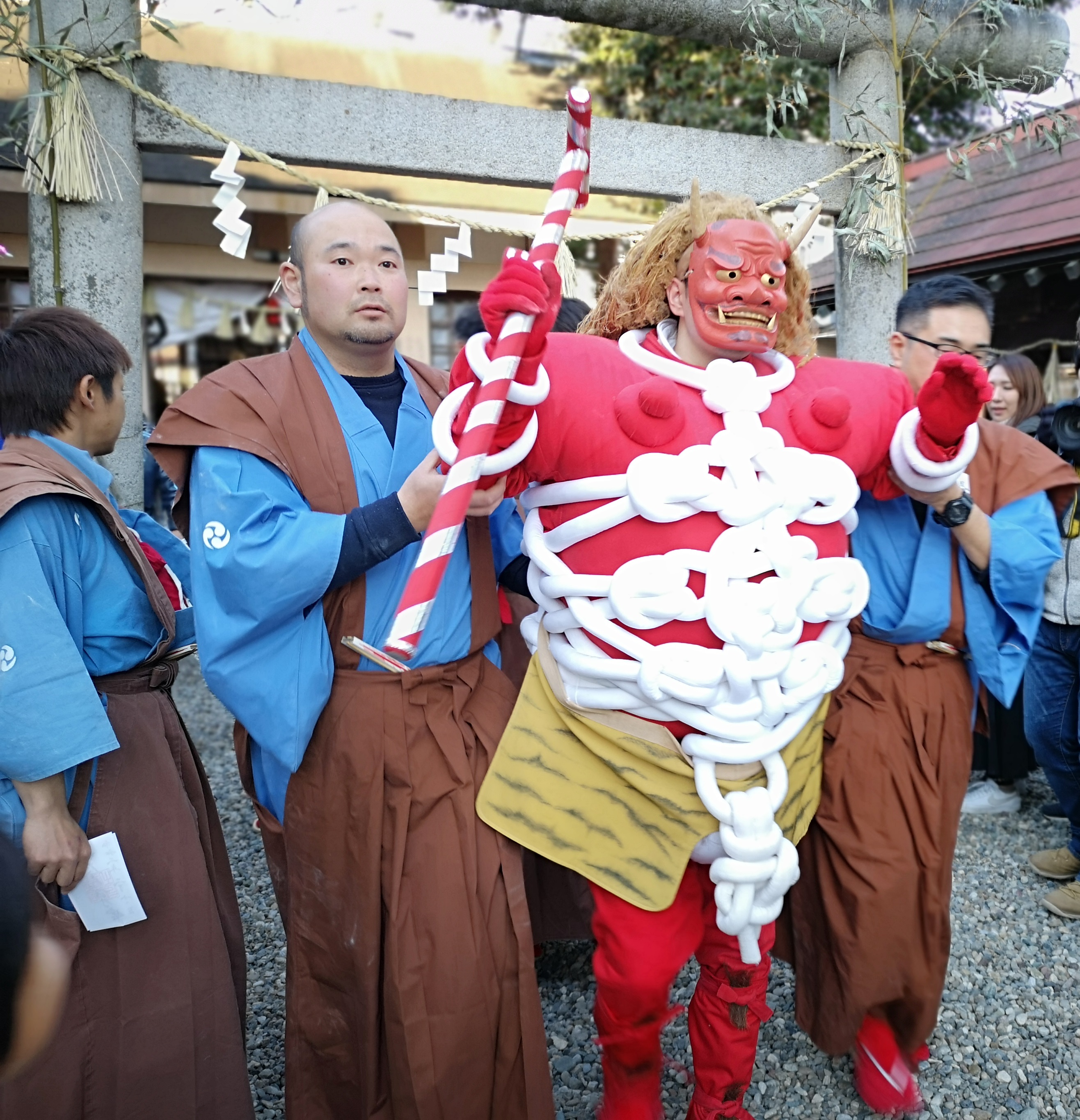 愛知県豊橋市の安久美神戸神明社の例祭「鬼祭」の赤鬼。周囲の者は「鬼附」とよばれる鬼の世話係